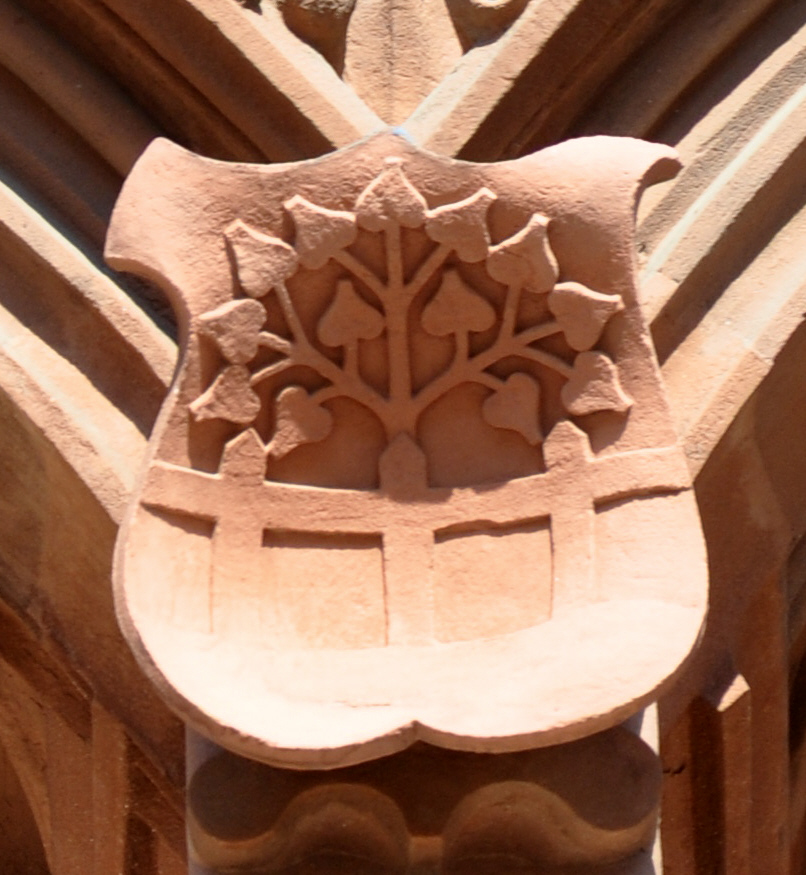 Frankfurt am Main, Rathaus (Römer), Haus zum Römer, Fassade, Wappen am Balkon, obere Reihe, Nr. 9: Familie Barckhaus